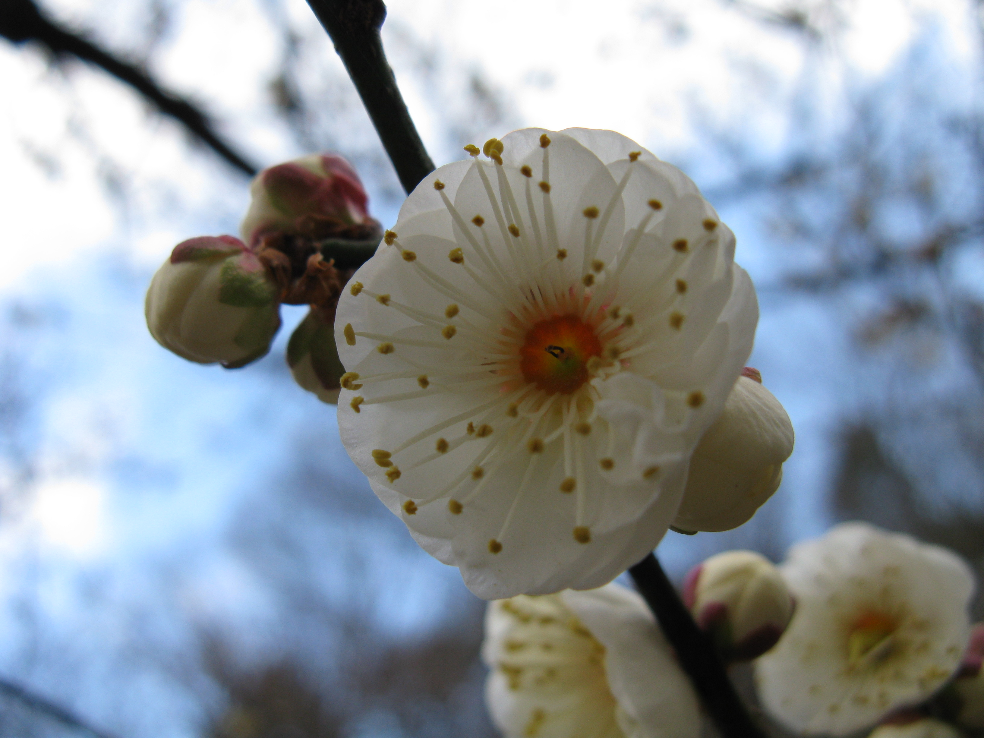 Prunus mume 'Yabai'